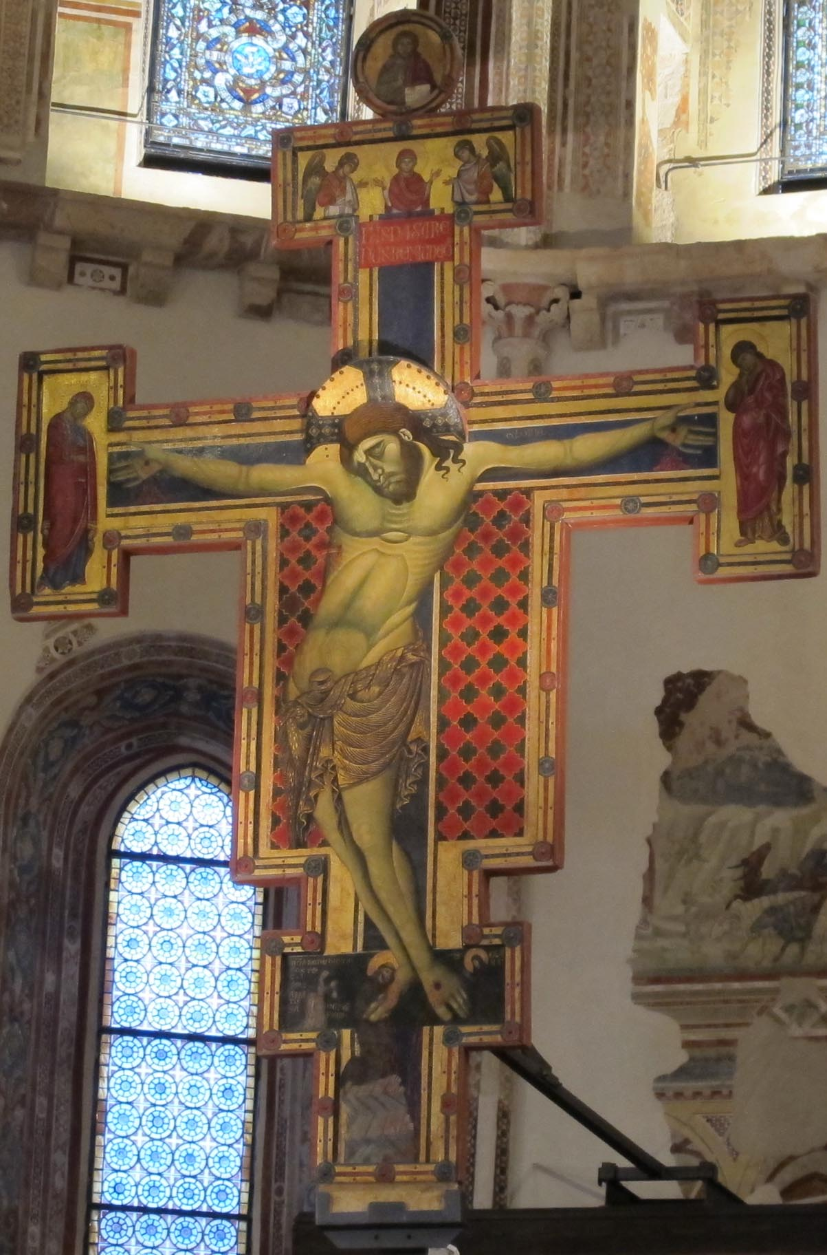 Assisi, santa chiara, interno, maestro di santa chiara, croce dipinta 2